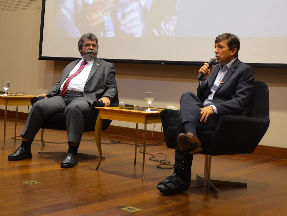 O fundador do Partido Novo participou, na Casa da Indústria, em Natal, da 1ª edição do Fórum Sistema FIERN Caminhos do Brasil